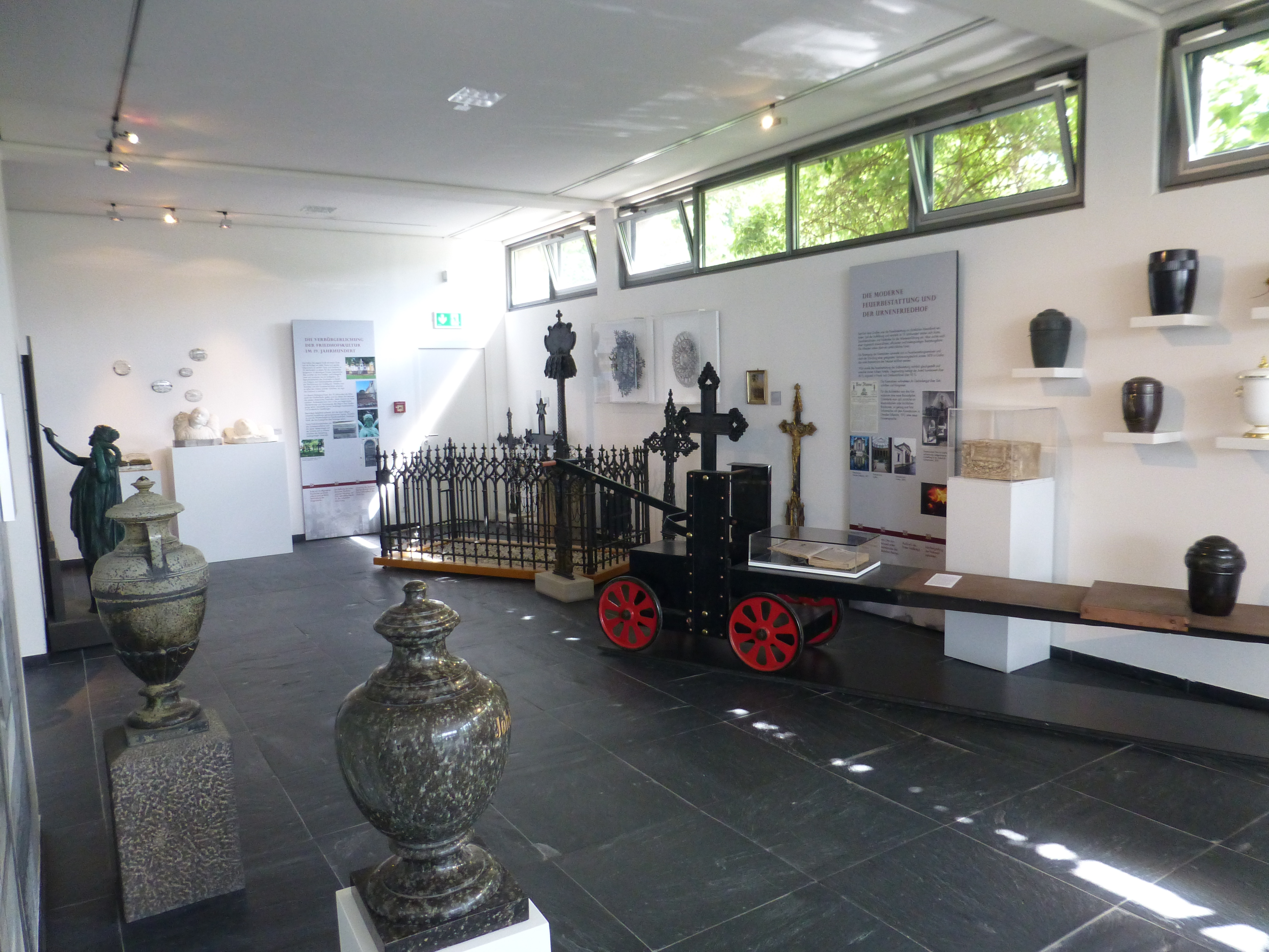 Museum für Sepulkralkultur, Kassel; Innenaufnahme eines Ausstellungsraums